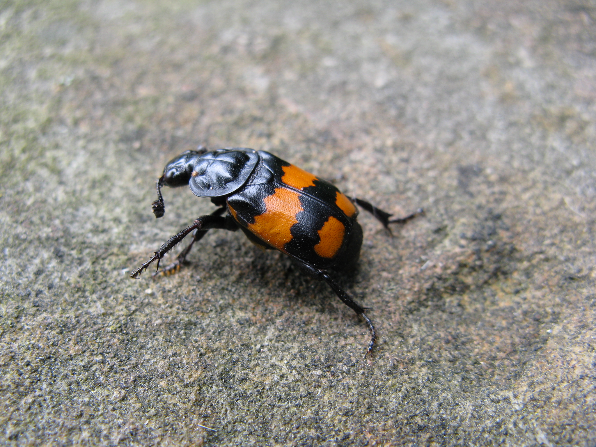 Hrobařík malý